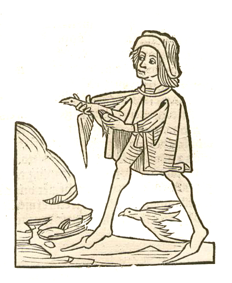 Abbildung von Celidonius - Stein aus dem Magen der Schwalbe